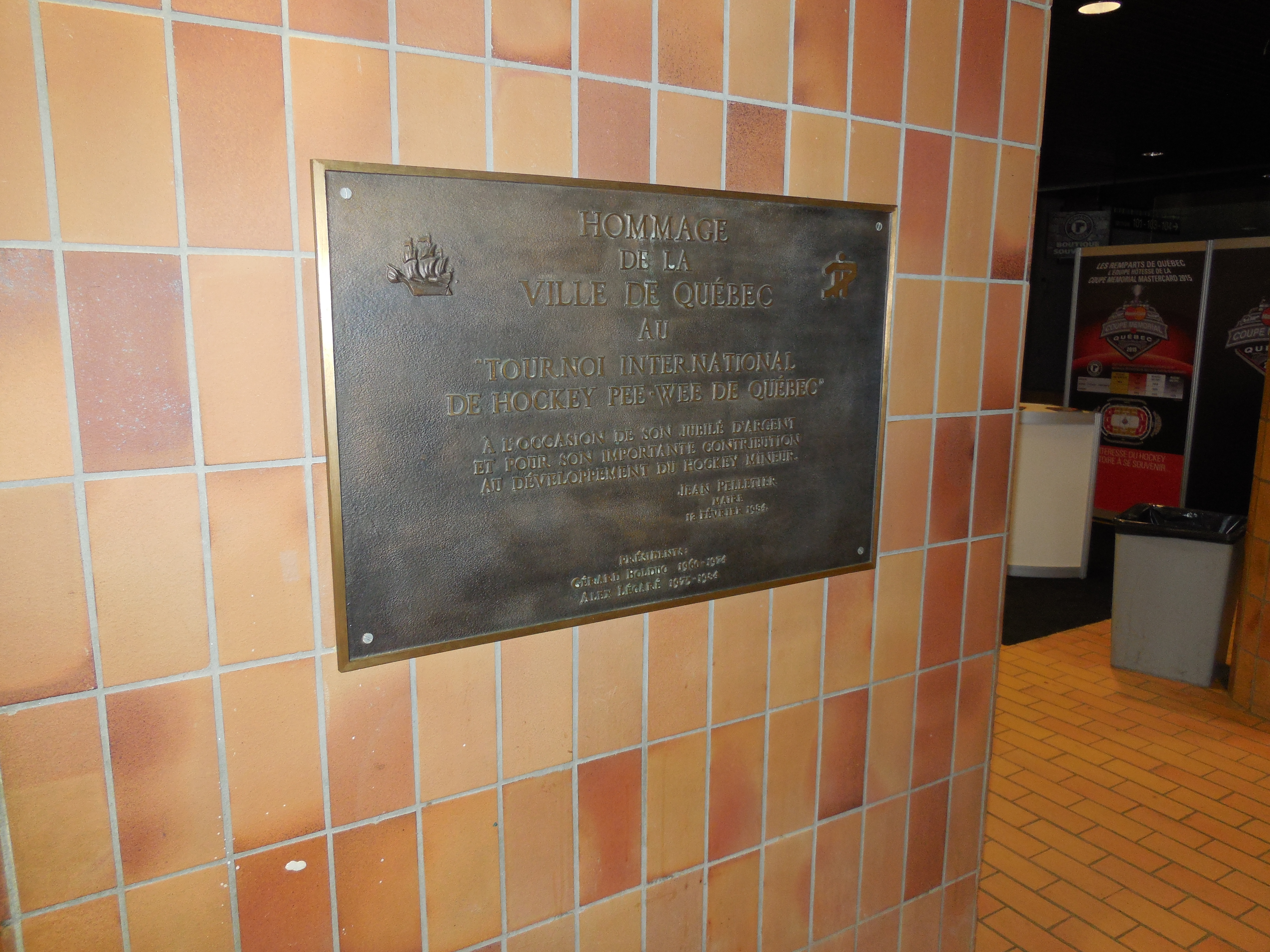 Plaque installée sur une colonne de l'entrée du Colisée Pepsi (Québec)